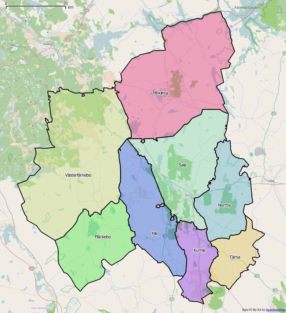 Distriktsindelningen i Sala kommun World file: 102.42542735416576249 0 0 -102.42542735416576249 1785680.53301929286681116 8447176.48485304787755013